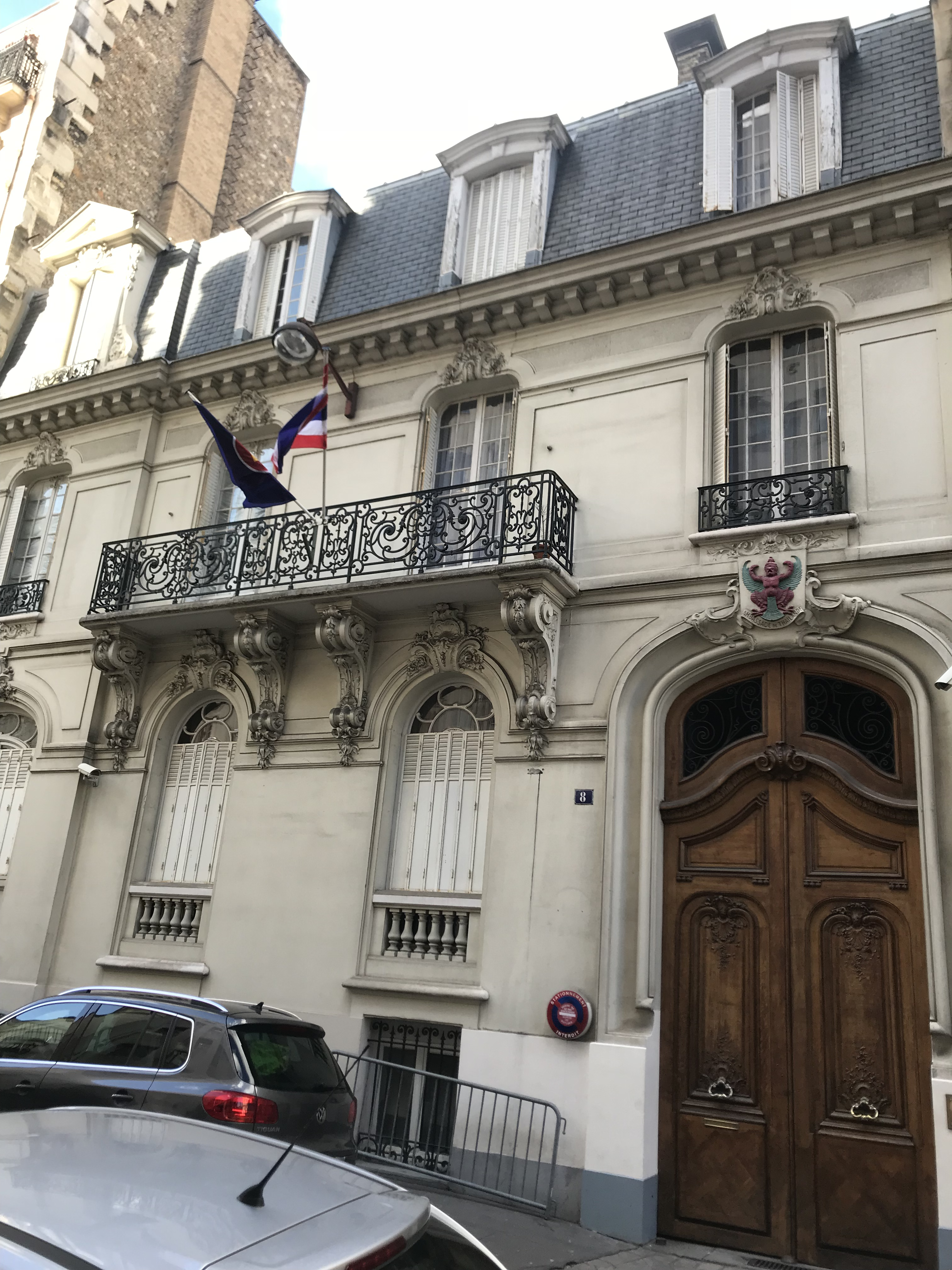 Ambassade de Thaïlande à Paris, mars 2018.